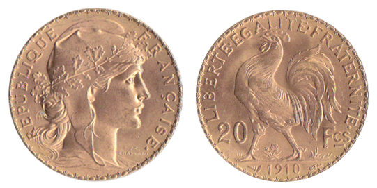 Avers et revers de la pièce en or de 20 francs type coq émise en 1910